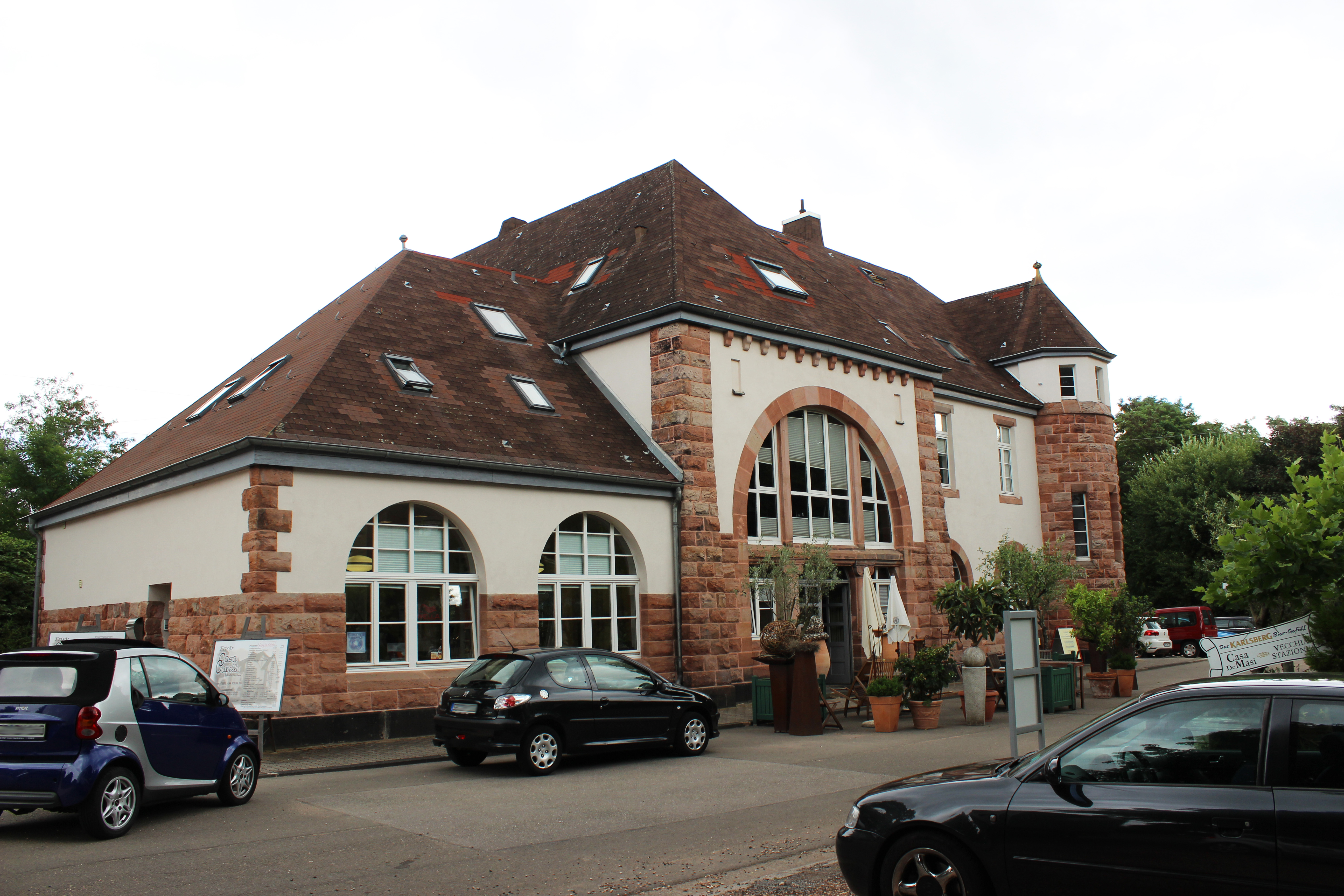 Ehemaliger Bahnhof Gersweiler, Saarbrücken, Saarland